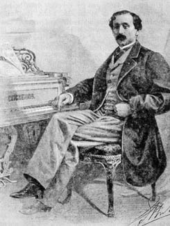 Portrait du compositeur franco-louisinais Louis Moreau Gottschalk.